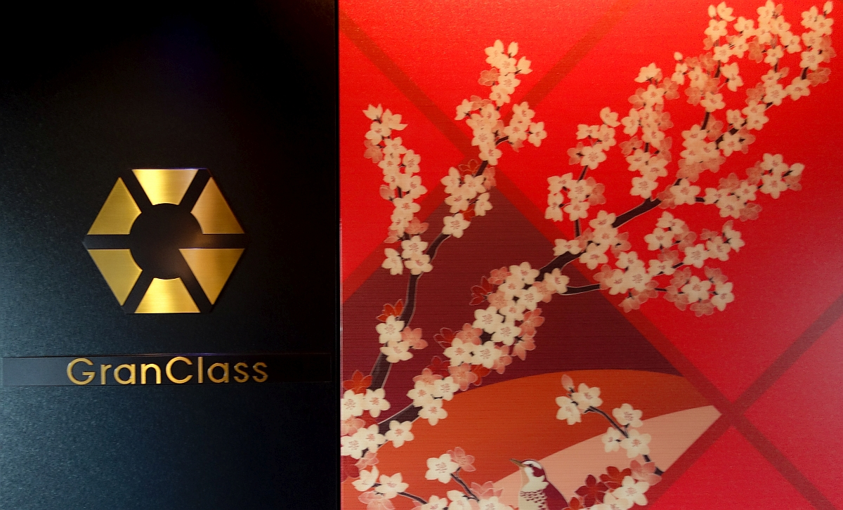 E7系 グランクラス エントランス（部分）